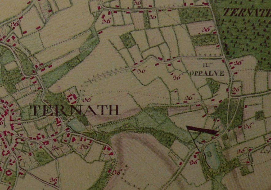 Ternath et Opalfene sur la carte de Ferraris